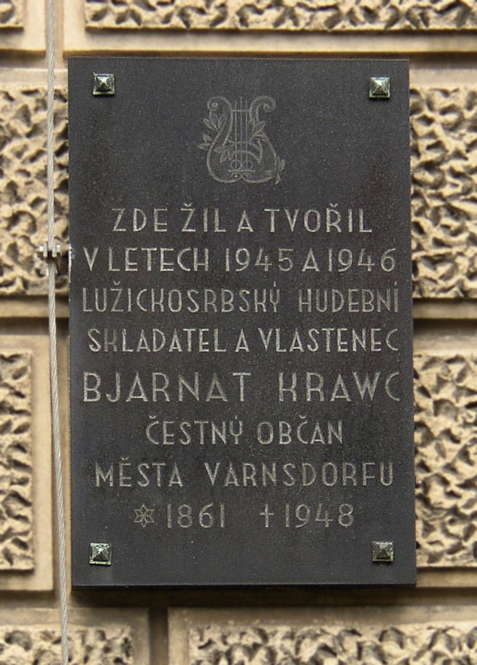 Pamětní deska věnovaná Bjarnatu Krawcovi ve Varnsdorfu, Varnsdorf, okres Děčín, Česká republika *Bjarnat Krawc *Bjarnat Krawc *hsb:Bjarnat Krawc